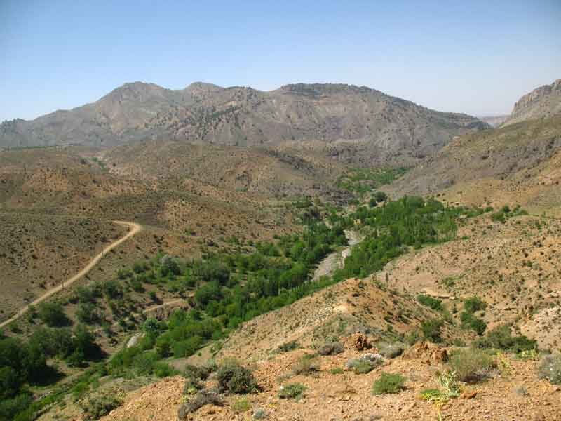 سرمشک